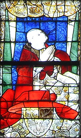 Guillaume Fillastre